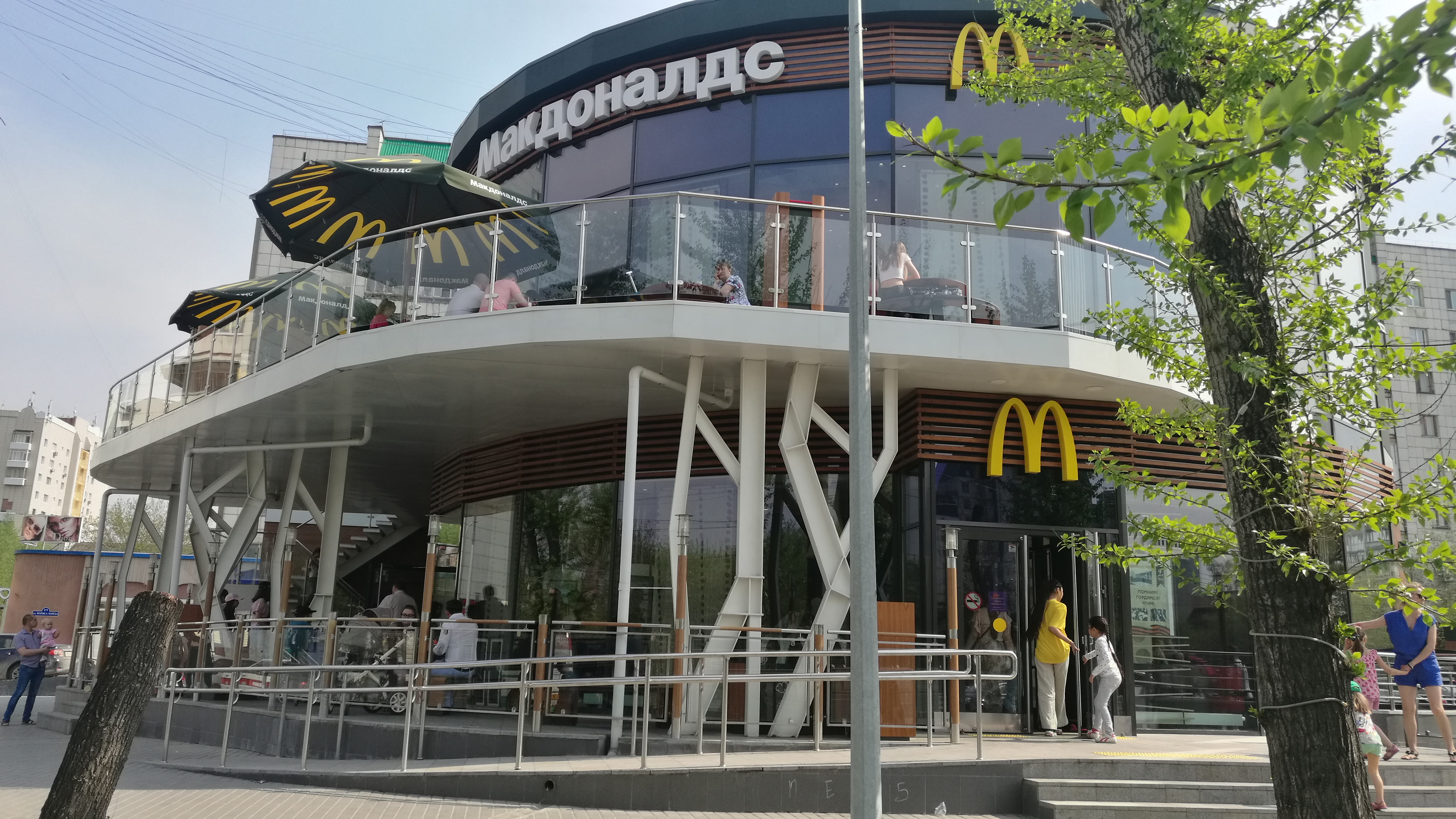 Strato Maurice Thorez. Tjumeno, Rusio.